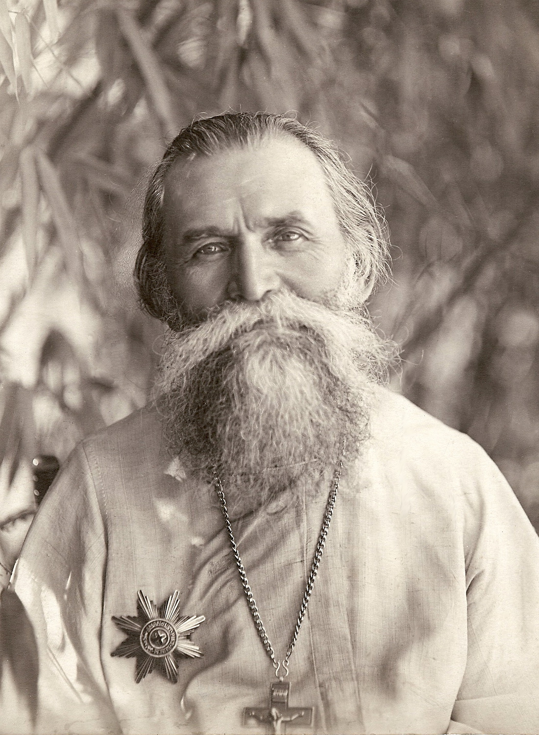 Протоиерей Григорий Остроумов (1856-1947), будущий архиепископ Каннский и Марсельский, первый настоятель Михаило-Архангельского храма в Каннах с 1894 по 1927 и с 1928 по 1947 года. Фото 1935 года.